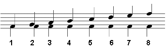 музичні інтервали